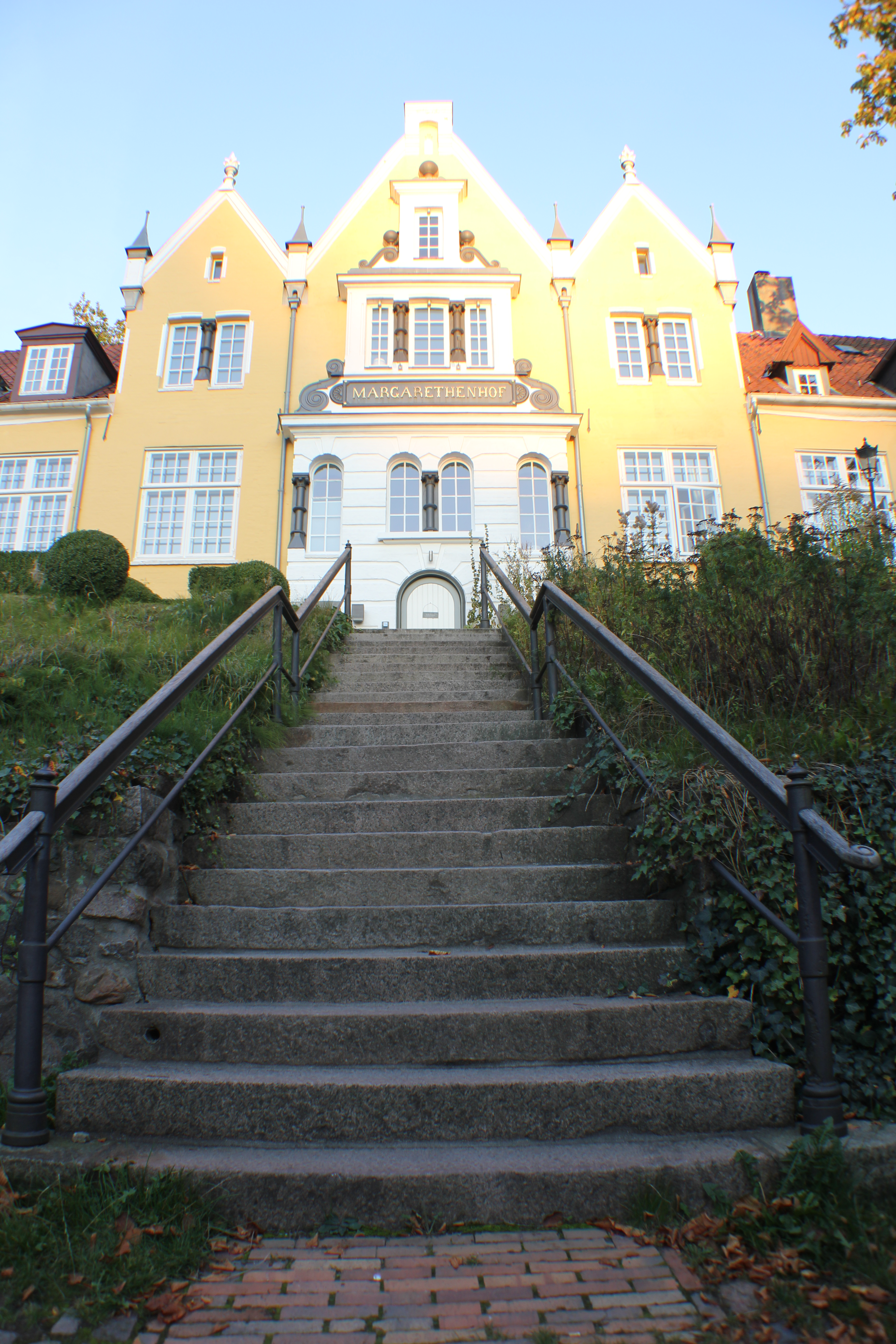 Margarethenhof, Herrenhaus (Flensburg 2013), Bild 02